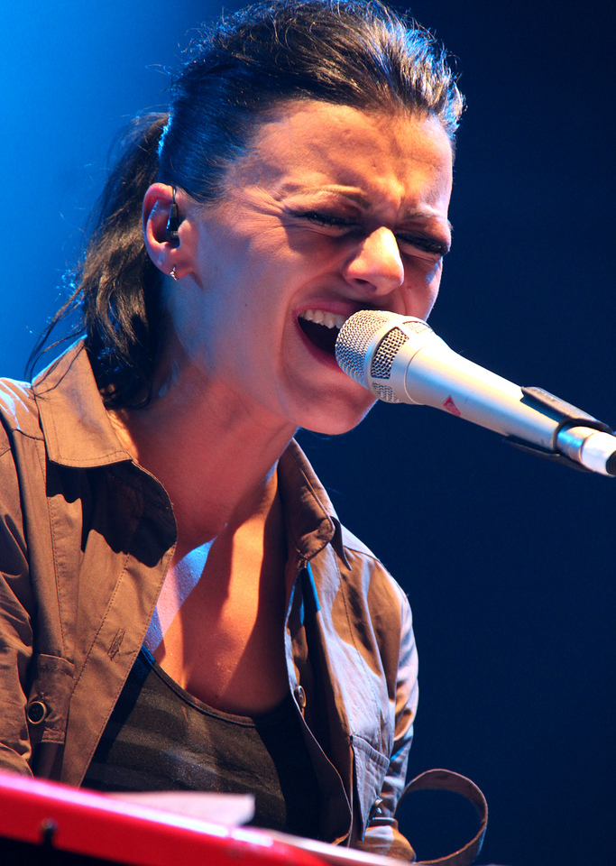 Baustelle